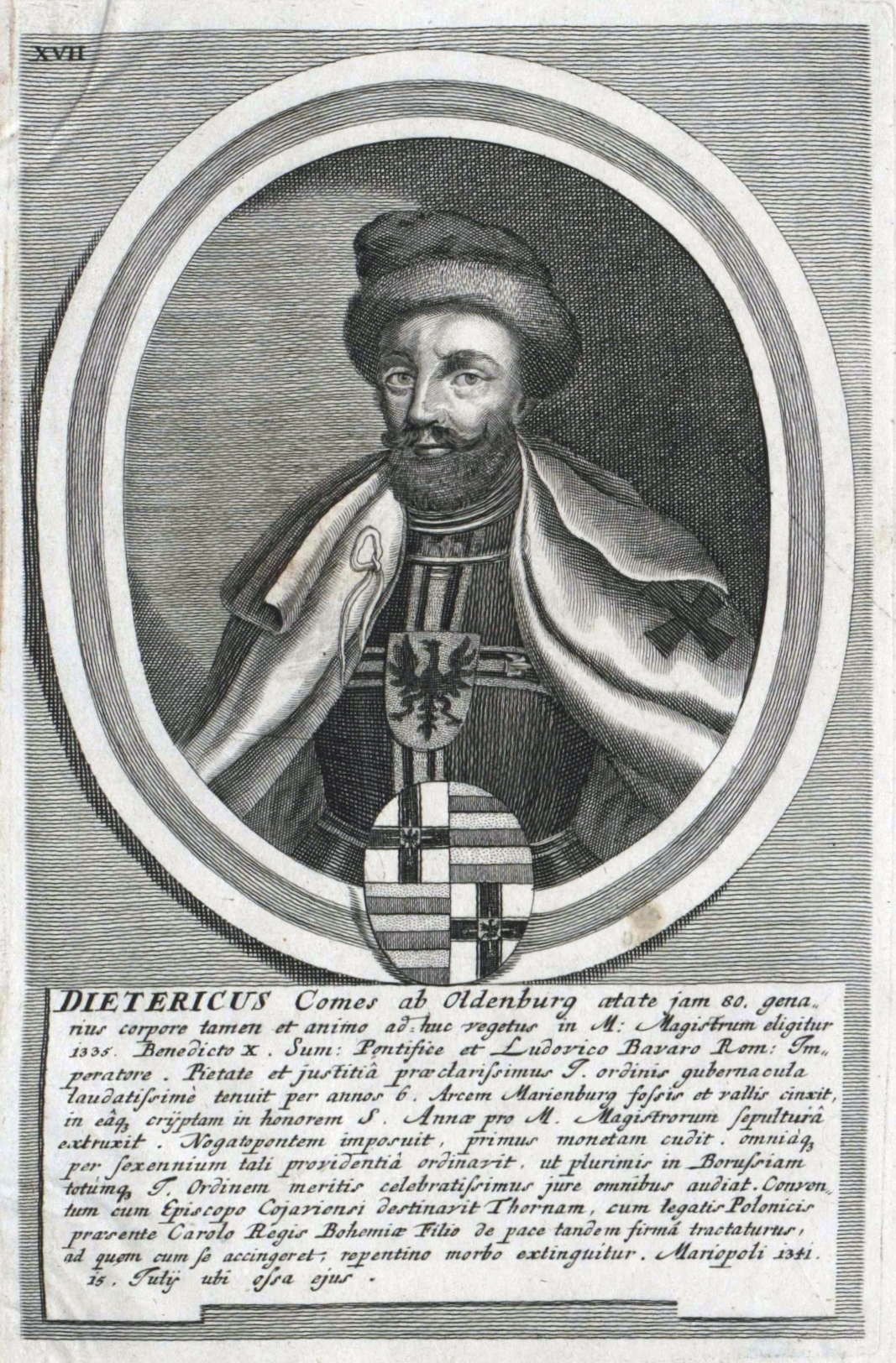 Dietrich von Altenburg († 1341)